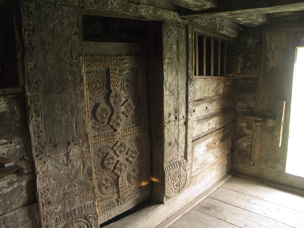 Biserica de lemn din Ciumărna, portalul interior în pronaos.